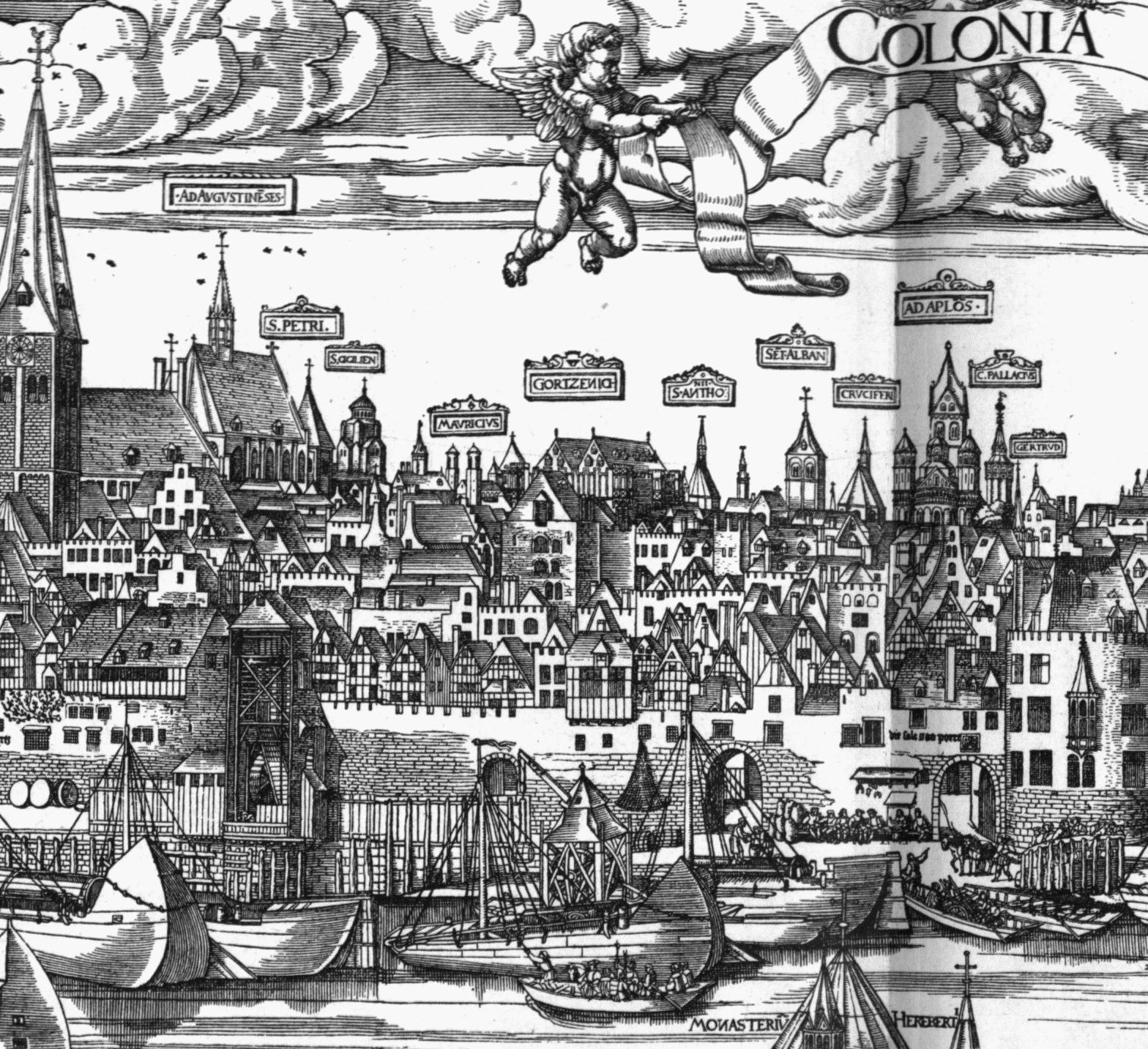 Holzschnitt: Woensam Gürzenich (1531)